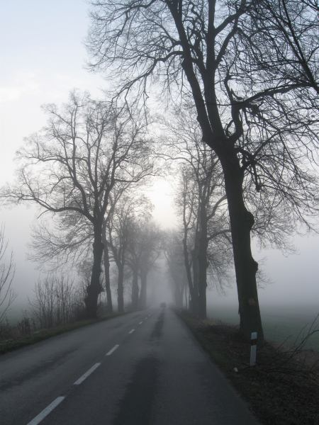 Stromořadí Lažánky - Jedovnice - památné stromy